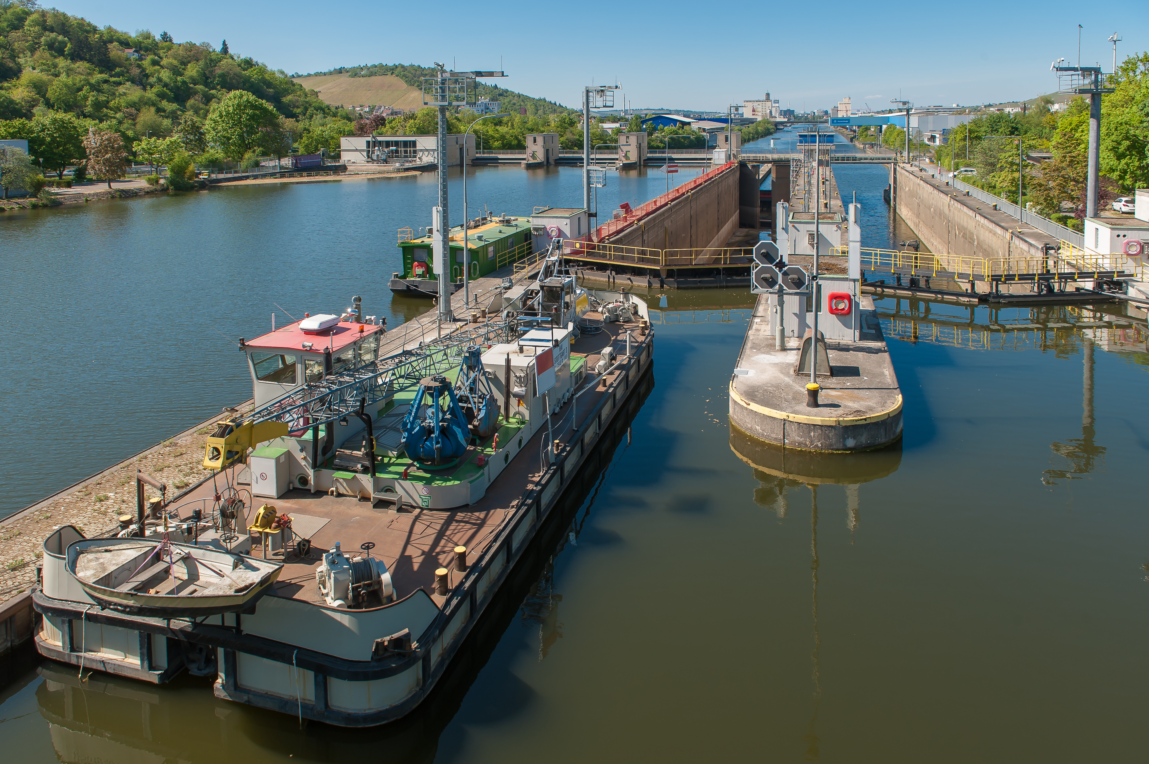 Neckarschleuse Stuttgart-Obertürkheim